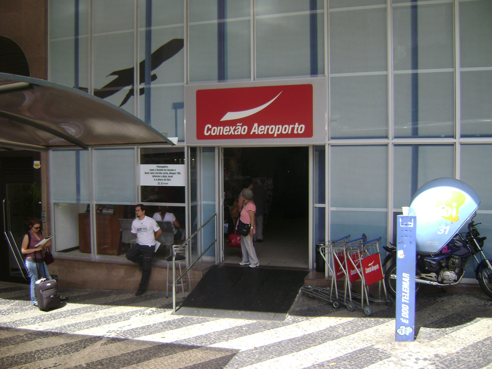 Entrada do Conexão Aeroporto, na avenida Álvares Cabral, em Belo Horizonte, Minas Gerais, Brasil.